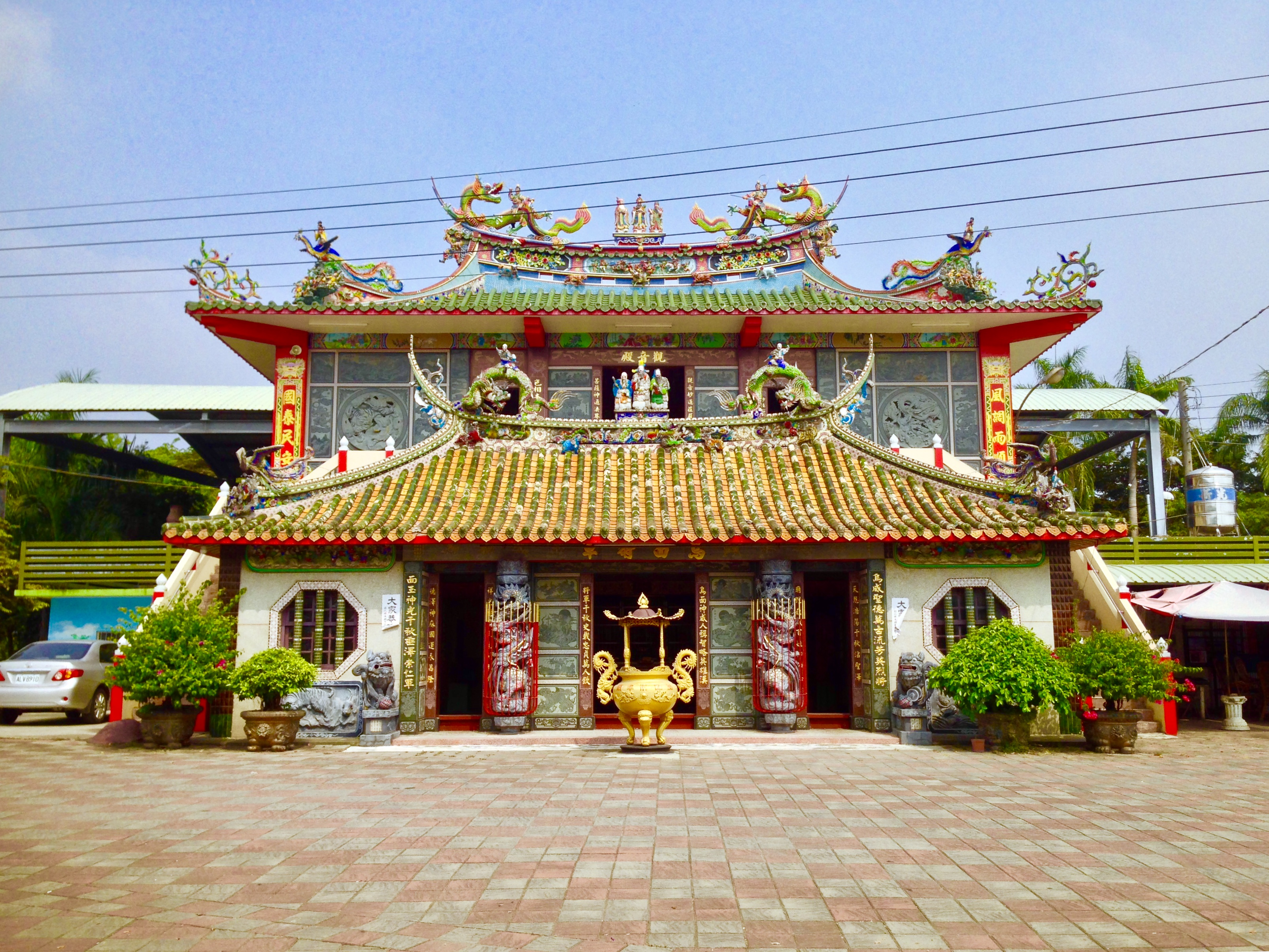 中文（台灣）: 烏面將軍廟正面照